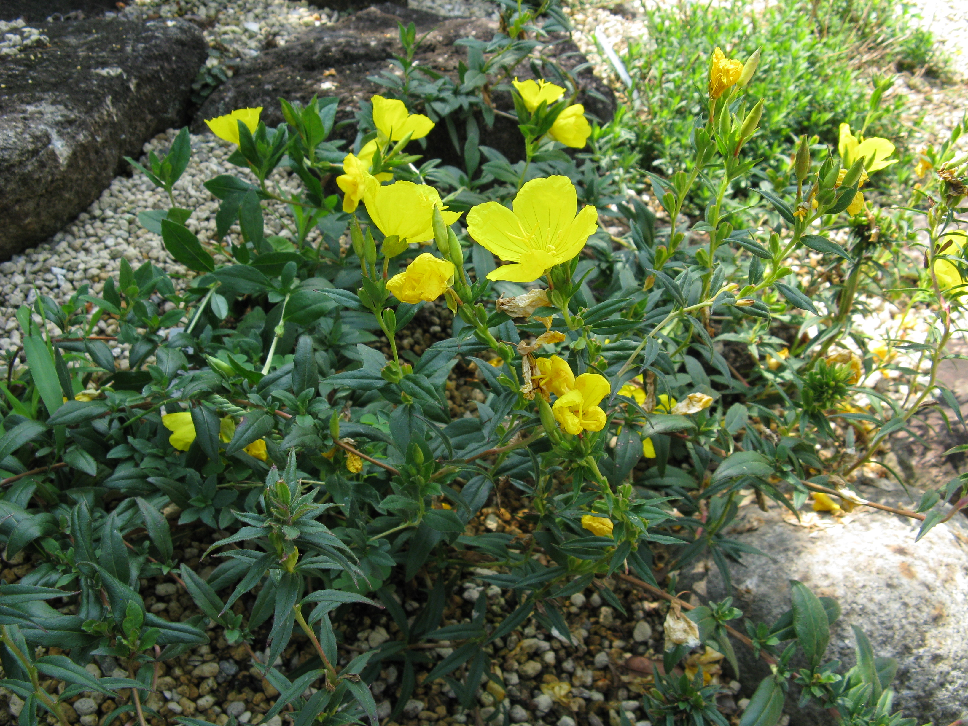 Scientific name Oenothera fruticosa